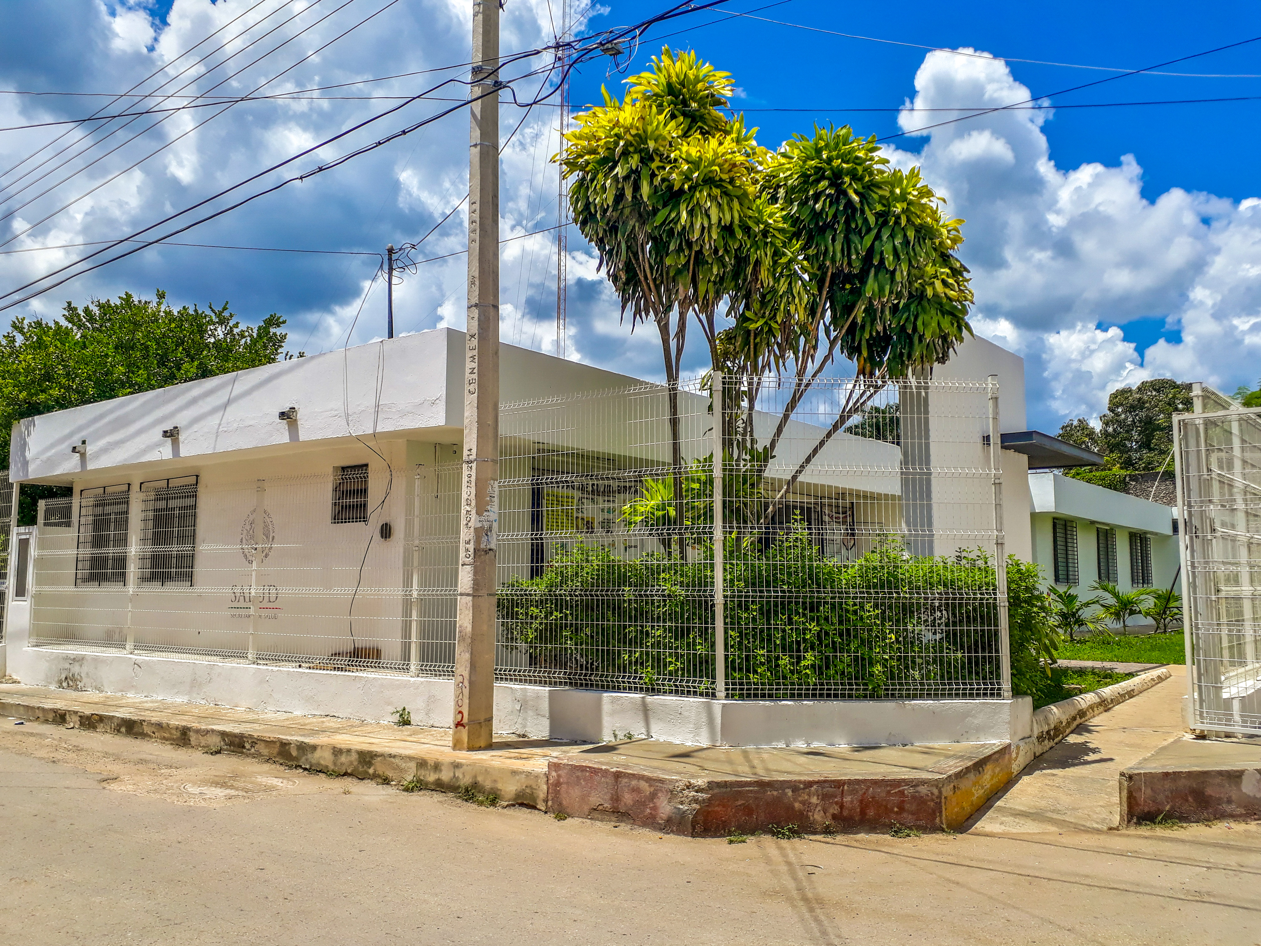 Centro de salud en Espita, Yucatán en 2018.